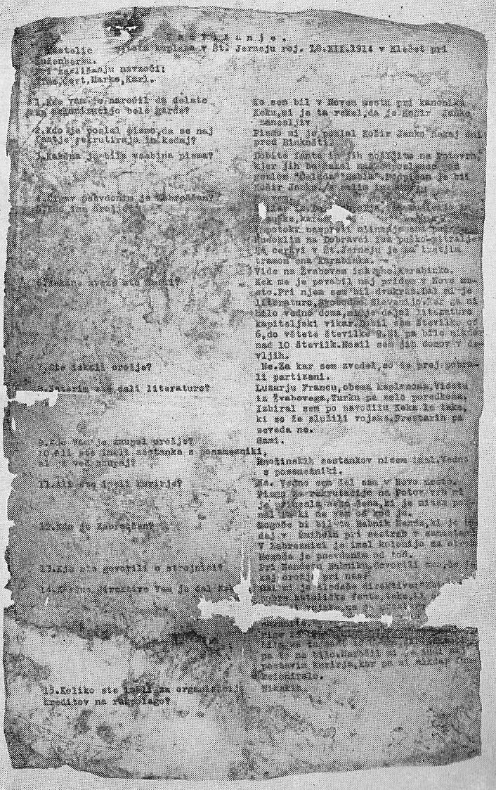 Zapisnik zaslišanja kaplana Kastelica 30. junija 1942